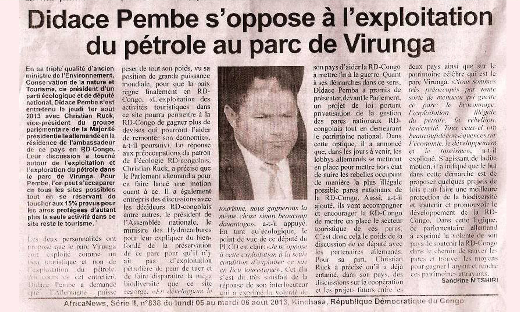 Africa News, Série II du 05 août 2013